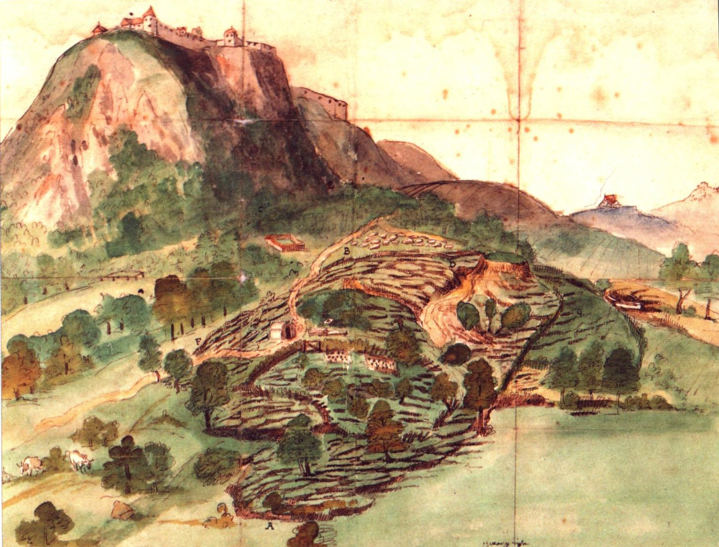 Hohentwiel 1588: Älteste wirklichkeitsnahe Darstellung des Hohentwiels durch den Stuttgarter Hans Dorn, anlässlich eines Erdrutsches